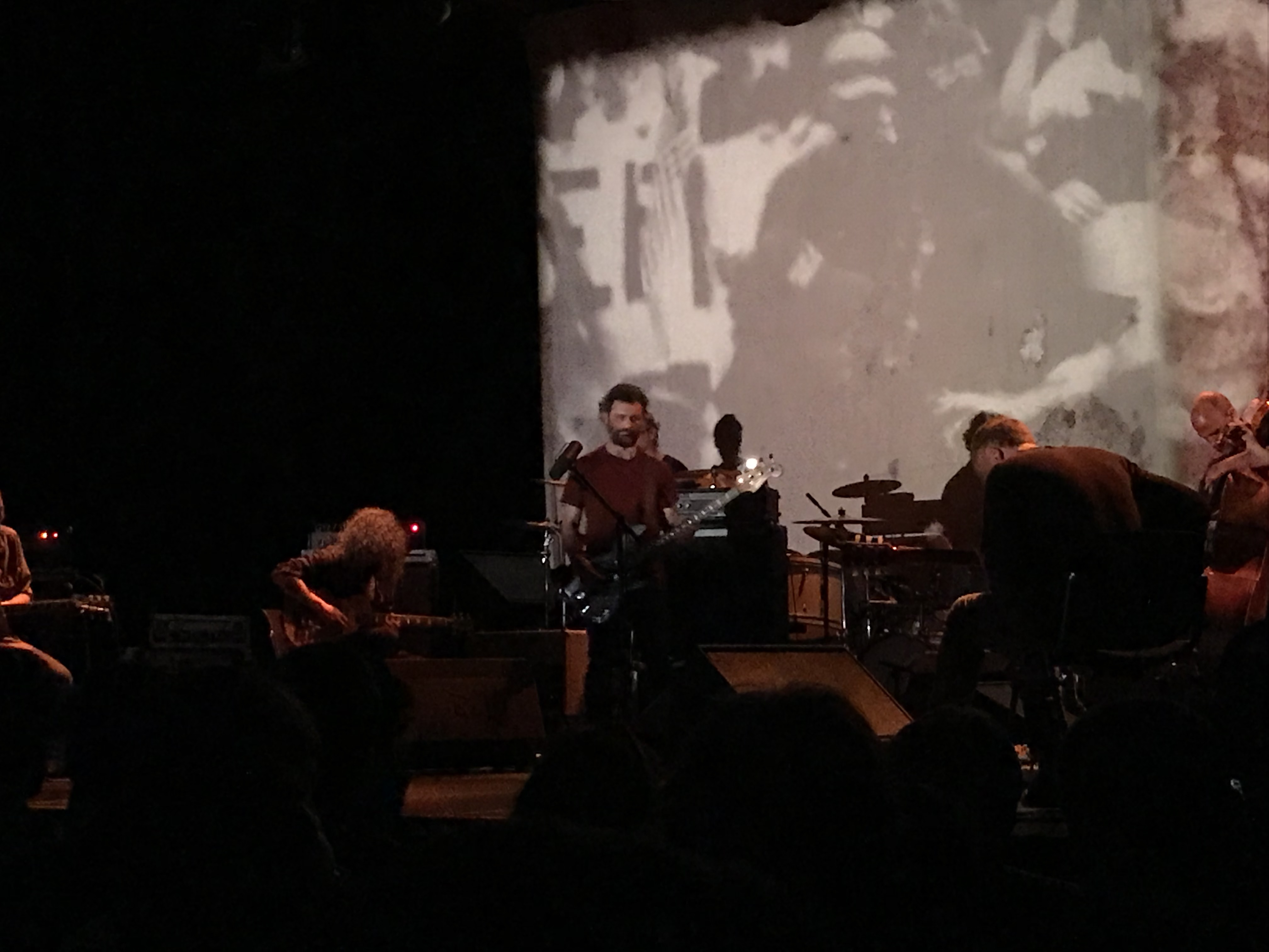 Mauro Pezzente, en concert no Batschkapp, na cidade de Frankfurt, Abril 2018.